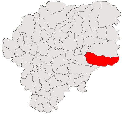 Categorie:Hărţi ale judeţului Bistriţa-Năsăud